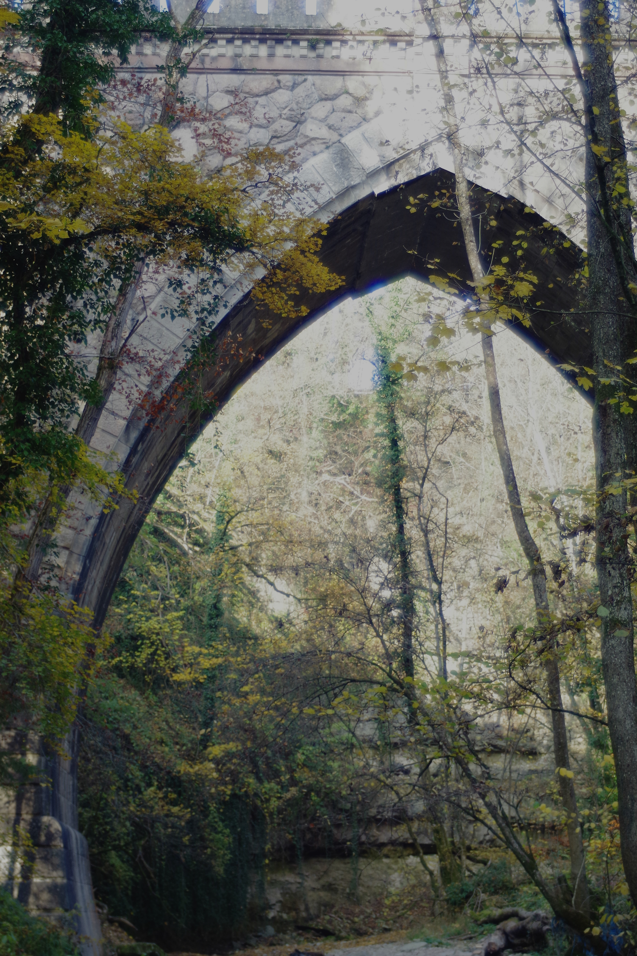 Steinaviadukt bei Tiengen/Unterlauchringen, ausgeführt als Spitzbogenbrücke, fertiggestellt 1862